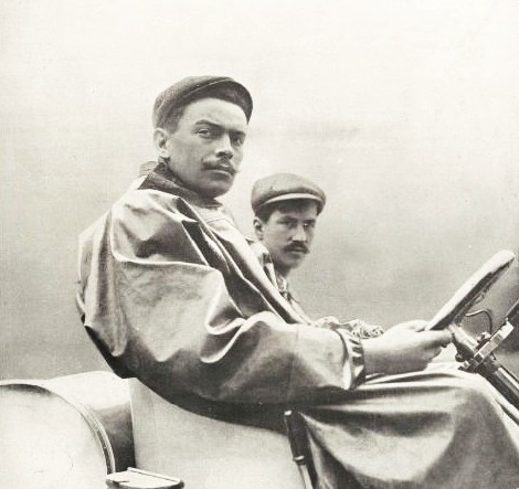 Louis Wagner, vainqueur de la Coupe Vanderbilt 1906 (La Vie au Grand Air du 13 octobre 1906)